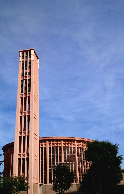 Église Saint-Pierre d'Yvetot (Inscrit) .